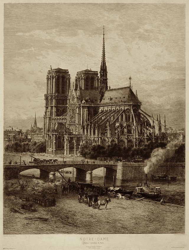 Notre-Dame de Paris Alfred-Alexandre Delauney.